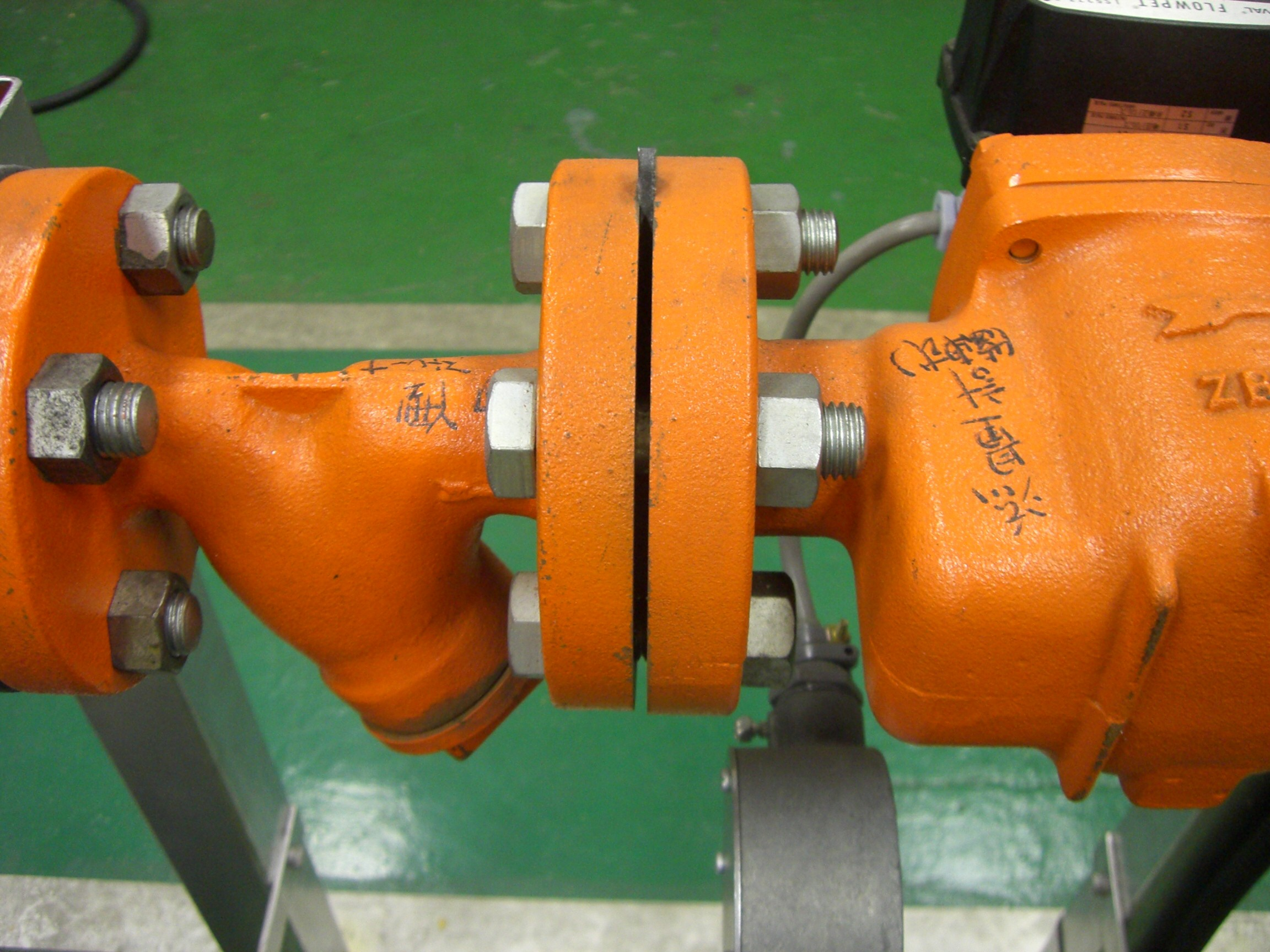 (Seal_(mechanical)); シール (シール (工学))ガスケット施工例、ボルトで止めたフランジの間に厚さ1mmのガスケットが挟んである。